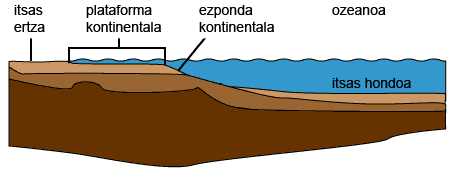 Itsas orografia: itsas ertza, plataforma kontinentala, ezponda kontinentala eta itsas hondoa